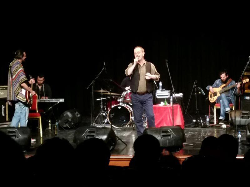 Törenin sonunda Hüsnü Arkan mini bir konser verdi. Fotoğraf: Eylem Nazlıer/Evrensel Gazetesi